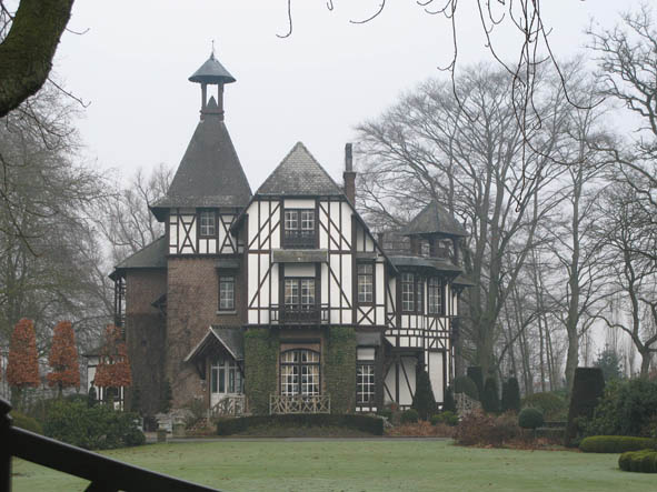 Waregem Felix Verhaeghestraat 21, 25-27